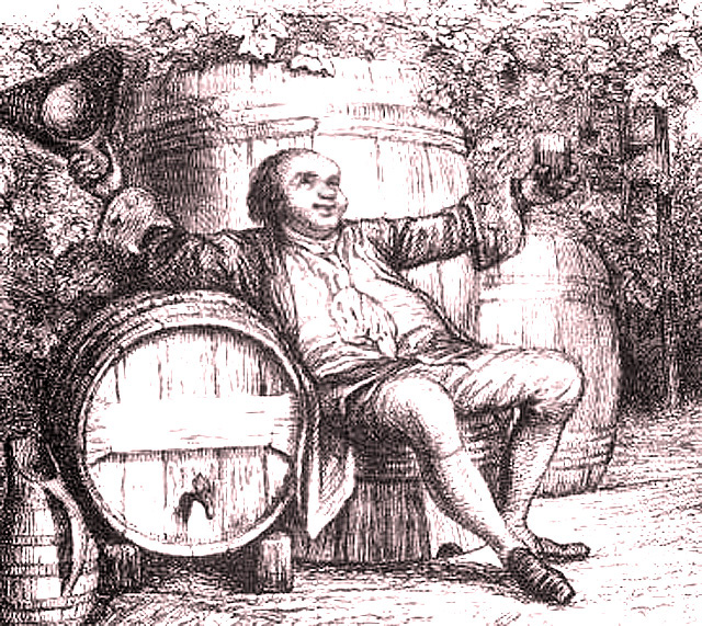 Propriétaire terrien dégustant son vin